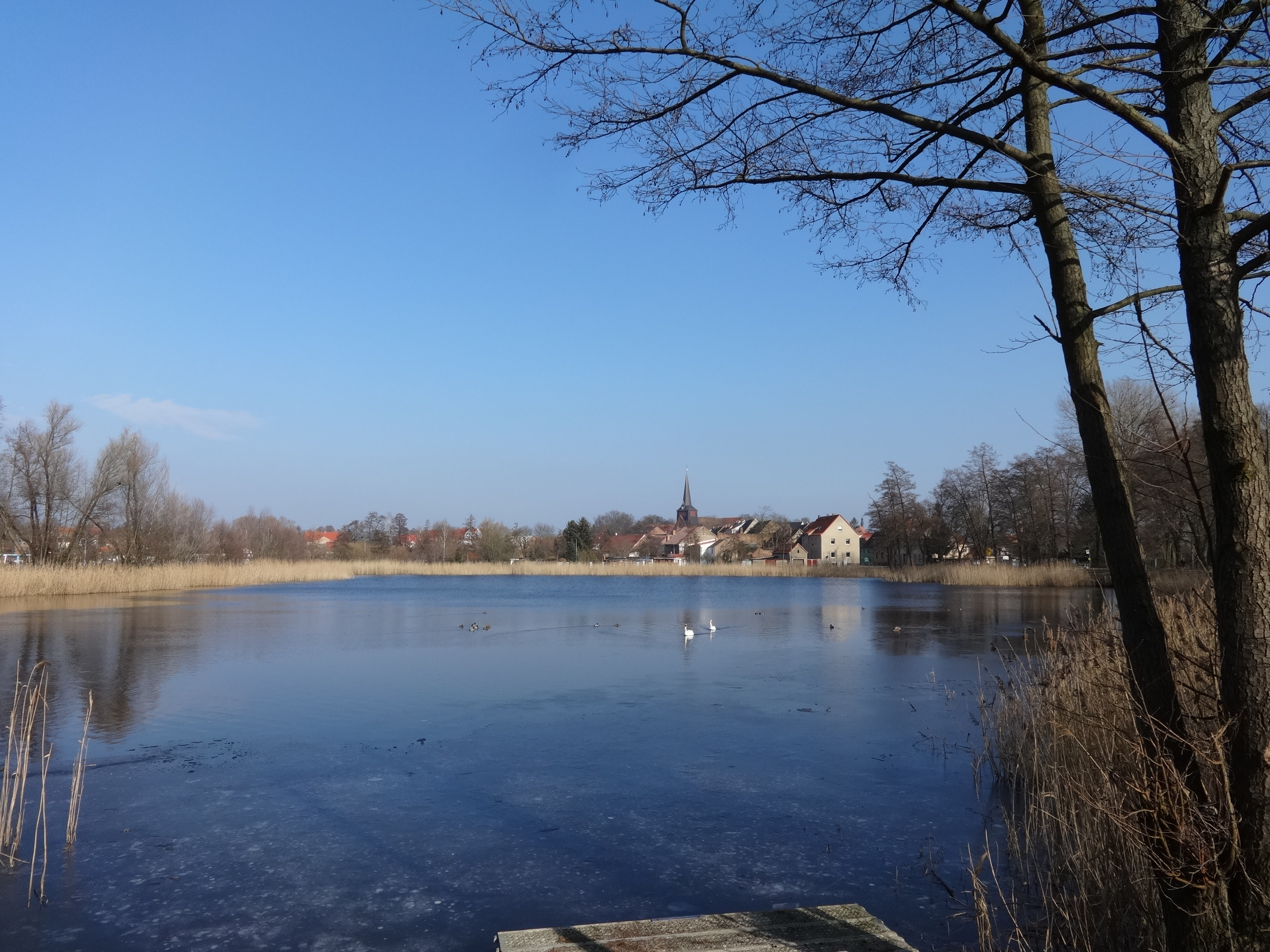 Der Spitzbubenweg ist ein rund 10 Kilometer langer Wanderweg in Jüterbog. Er führt um die historische, unter Denkmalschutz stehende Altstadt.